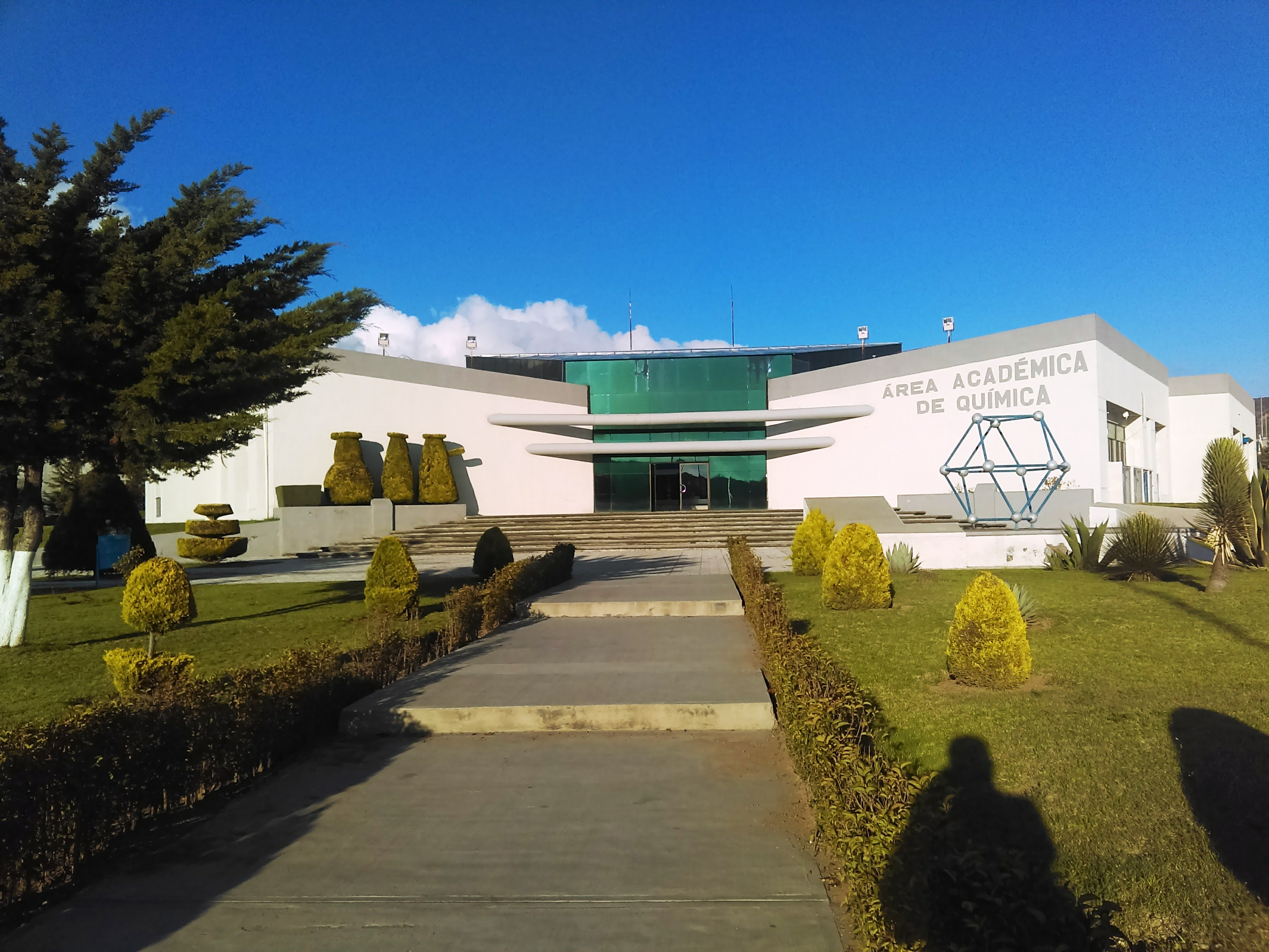 Ciudad del Conocimiento de la UAEH.